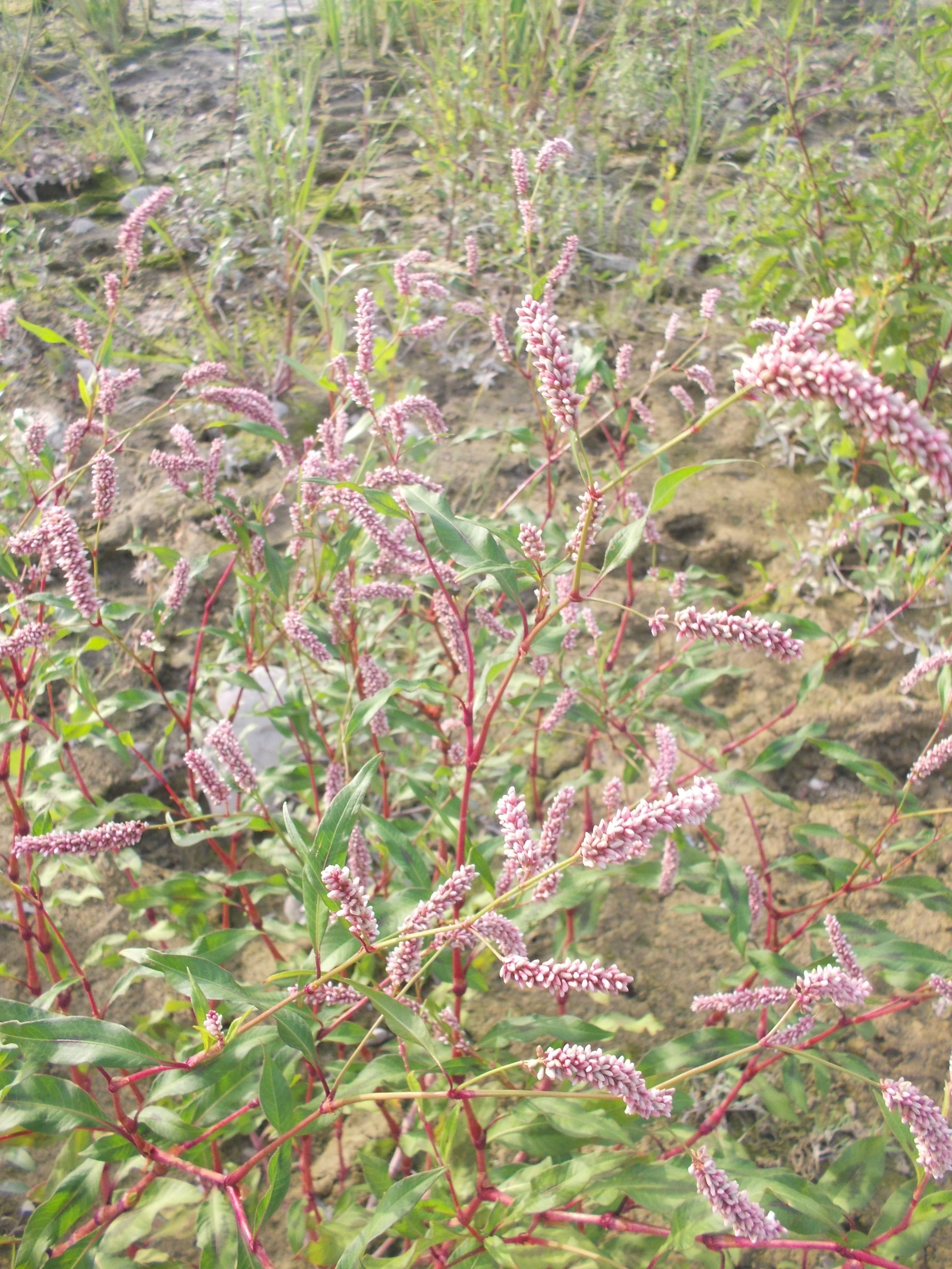 Una pianta di persicaria